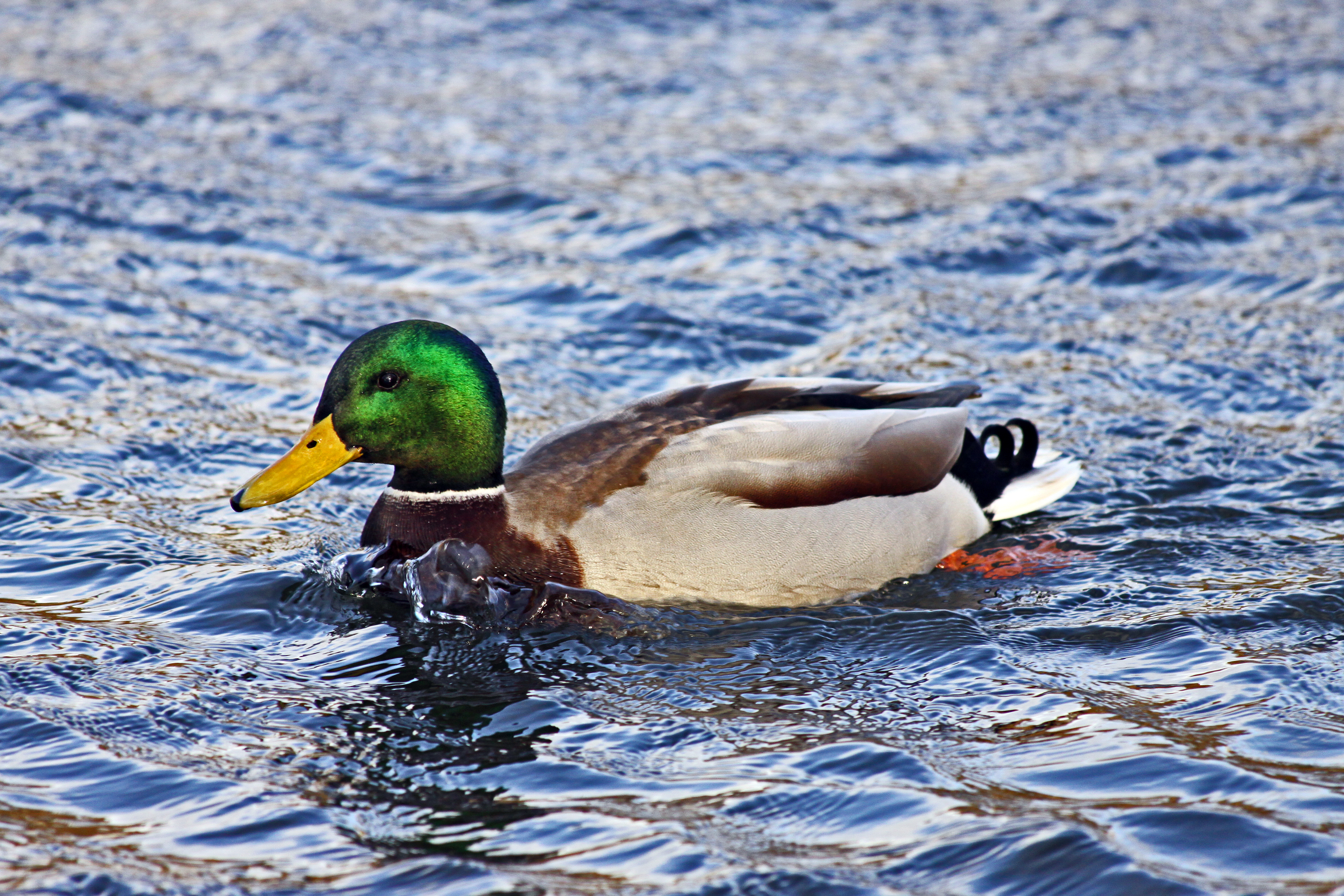 22. Dezember am Landwehrkanal in Berlin